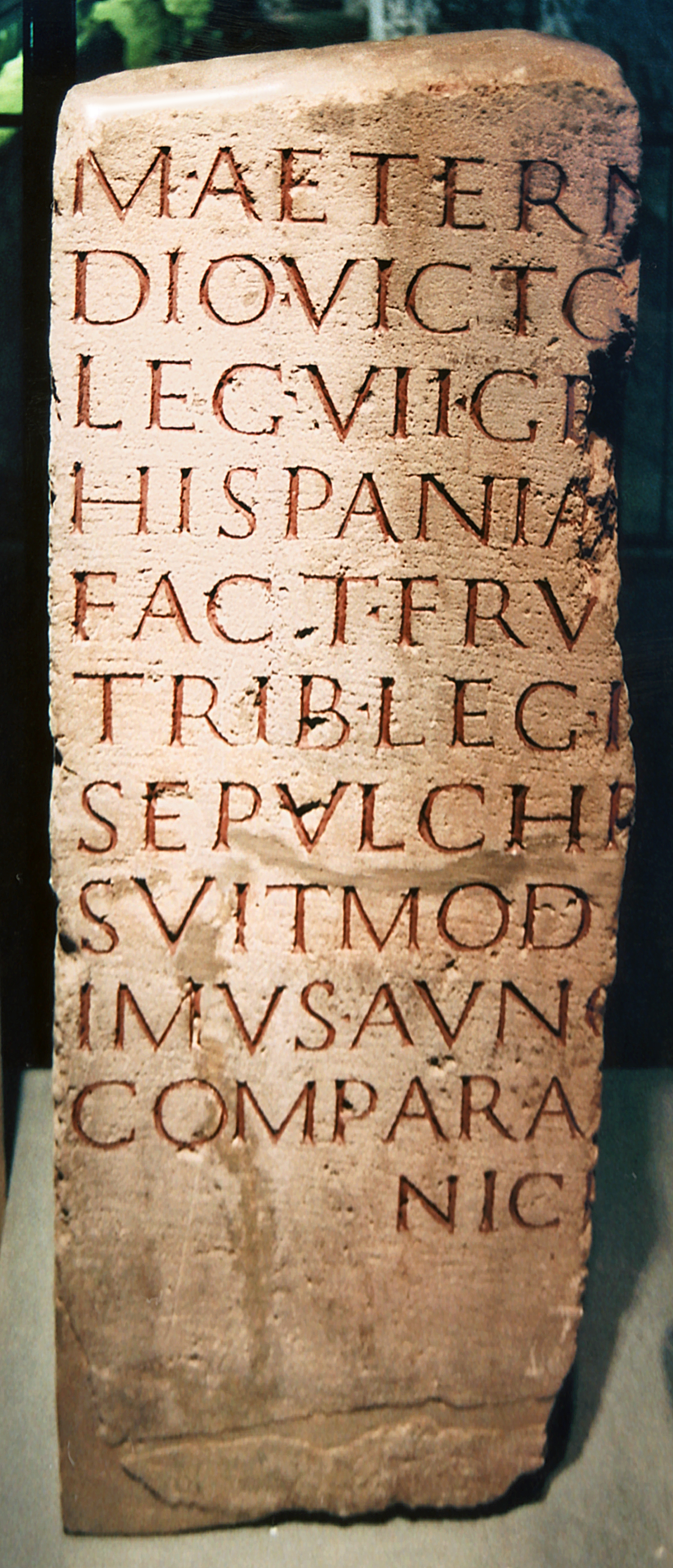 Römischer Grabstein aus Kalkstein; 2. Hälfte 2. - 1. Hälfte 3. Jhdt. (CIL XIII 8282) Größe: 89 cm x 35,5 cm x 21,5 cm Fundort: Köln; 1883, rund 2 Meter tief in der Friesenstraße, zwischen Norbertstraße und Steinfeldergasse, am Südende des römischen Gräberfeldes um St. Gereon. Aufbewahrungsort: Köln RGM Inschrift: M(emoriae) * aetern[ae Clau]/dio * Victo[ri mil(iti)] / leg(ionis) * VII * Ge[m(inae) p(iae) f(elicis) in] / Hispania [citer(iore)] /5 fact(o) * fru[m(entario), benef(iciario)] / trib(uni) * leg(ionis) * I * [Min(erviae) p(iae) f(idelis)]. / Sepulchr[um po]/suit Mod[ius Max]/imus av(u)nc[ulo in]/compara[bili et] / Nice [lib(ertae)]. Übersetzung: Der ewigen Erinnerung. Für Claudius Victor, Soldat der 7. Legion Gemina (Pia Felix) in Hispania Citerior, befördert zum Frumentarius und Benefiziarier des Tribunen der 1. Legion Minervia Pia Fidelis. Das Grabmal hat Modius Maximus errichtet, dem unvergleichlichen Onkel und (der Freigelassenen?) Nice. Photographiert mit einer Minolta X 700, einem Tokina 28-70-mm-Objektiv und dem Metz mecablitz 32 CT3 (System SCA 300).